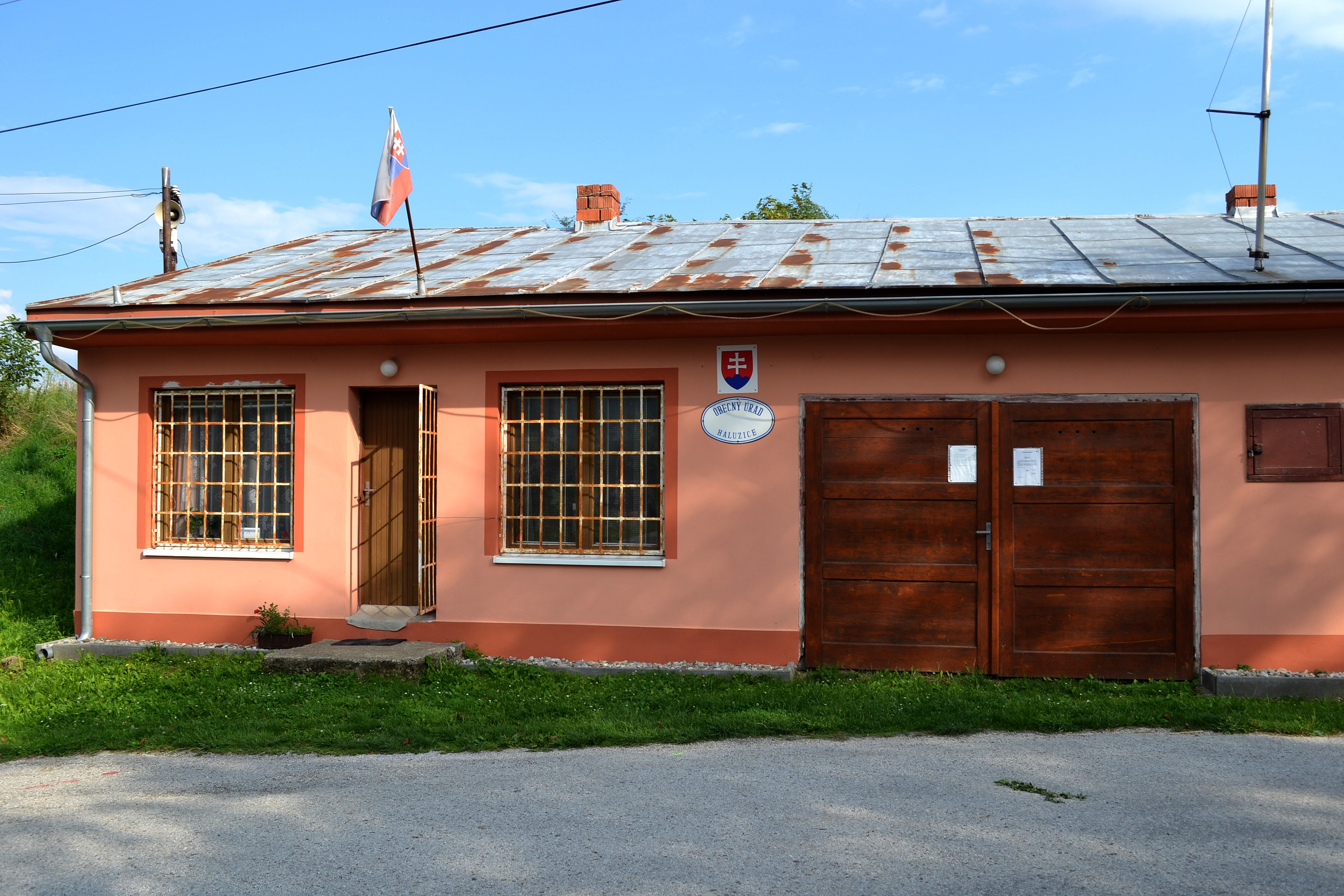 Budova obecného úradu v Haluziciach (okr. Nové Mesto nad Váhom)